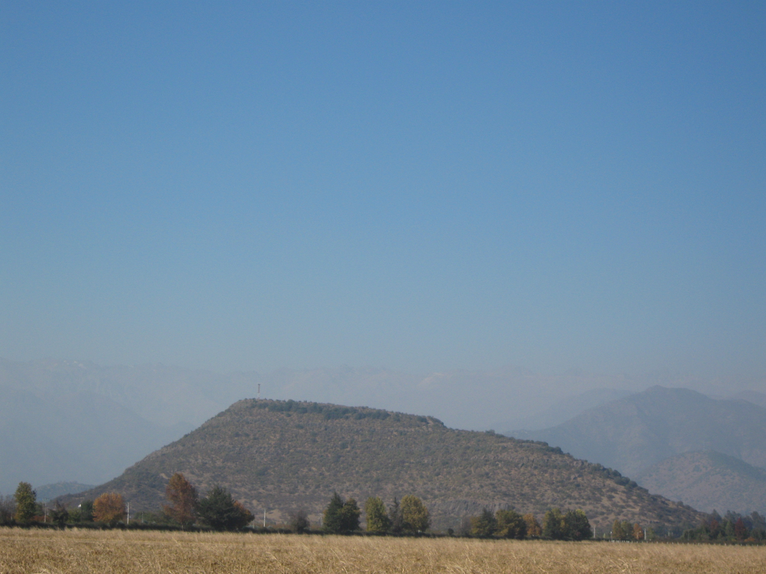 Cerro Grande de la Compañia